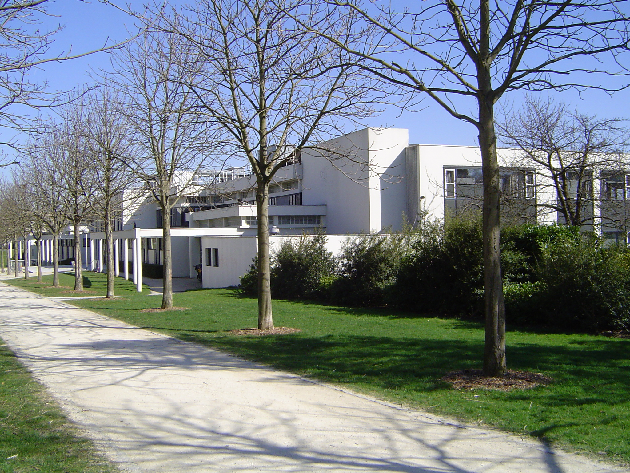 Photos prises à Lognes, commune française de Seine-et-Marne